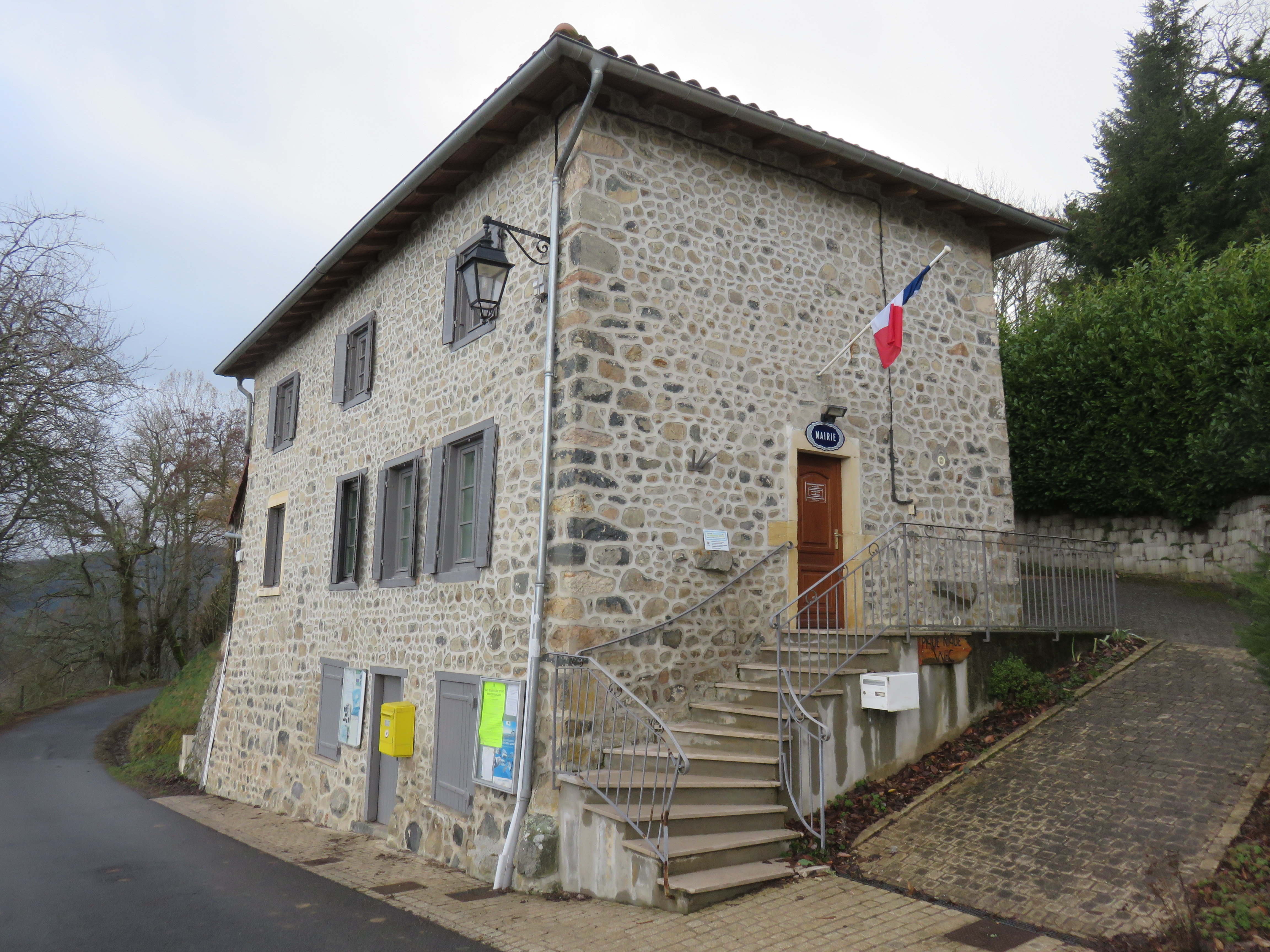 Mairie de Vernay (Rhône, France).